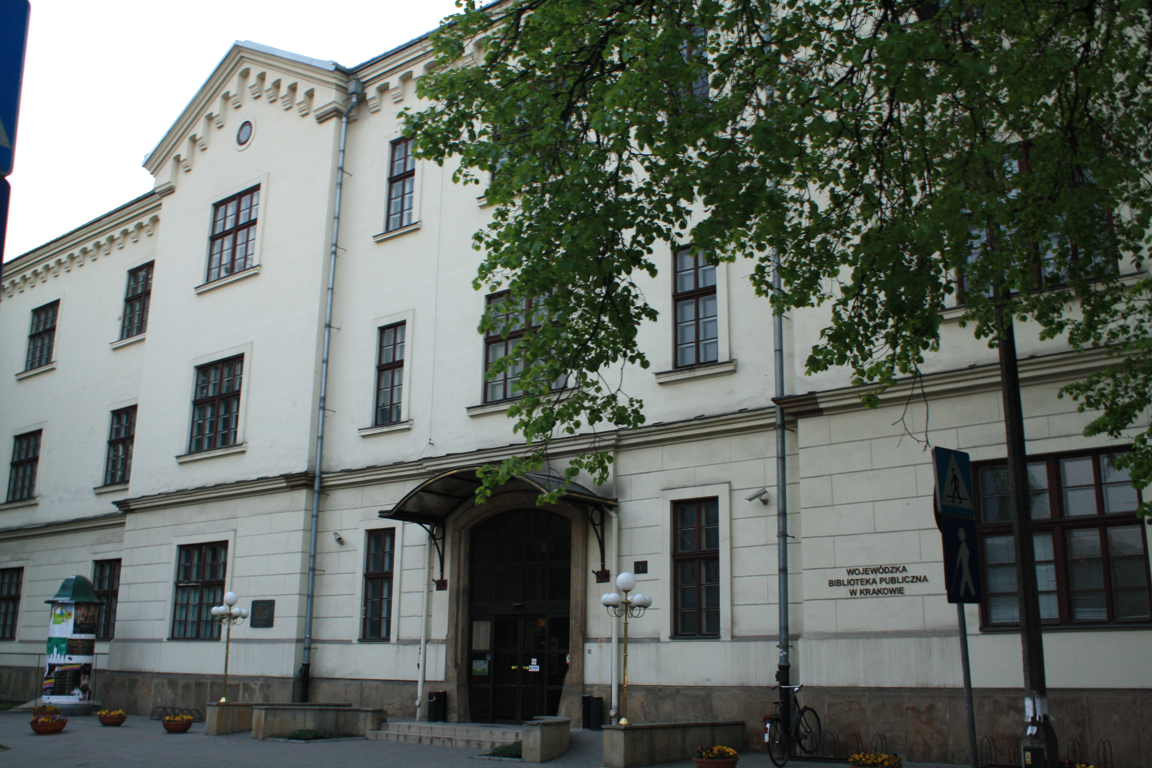 Wojewódzka Biblioteka Publiczna w Krakowie